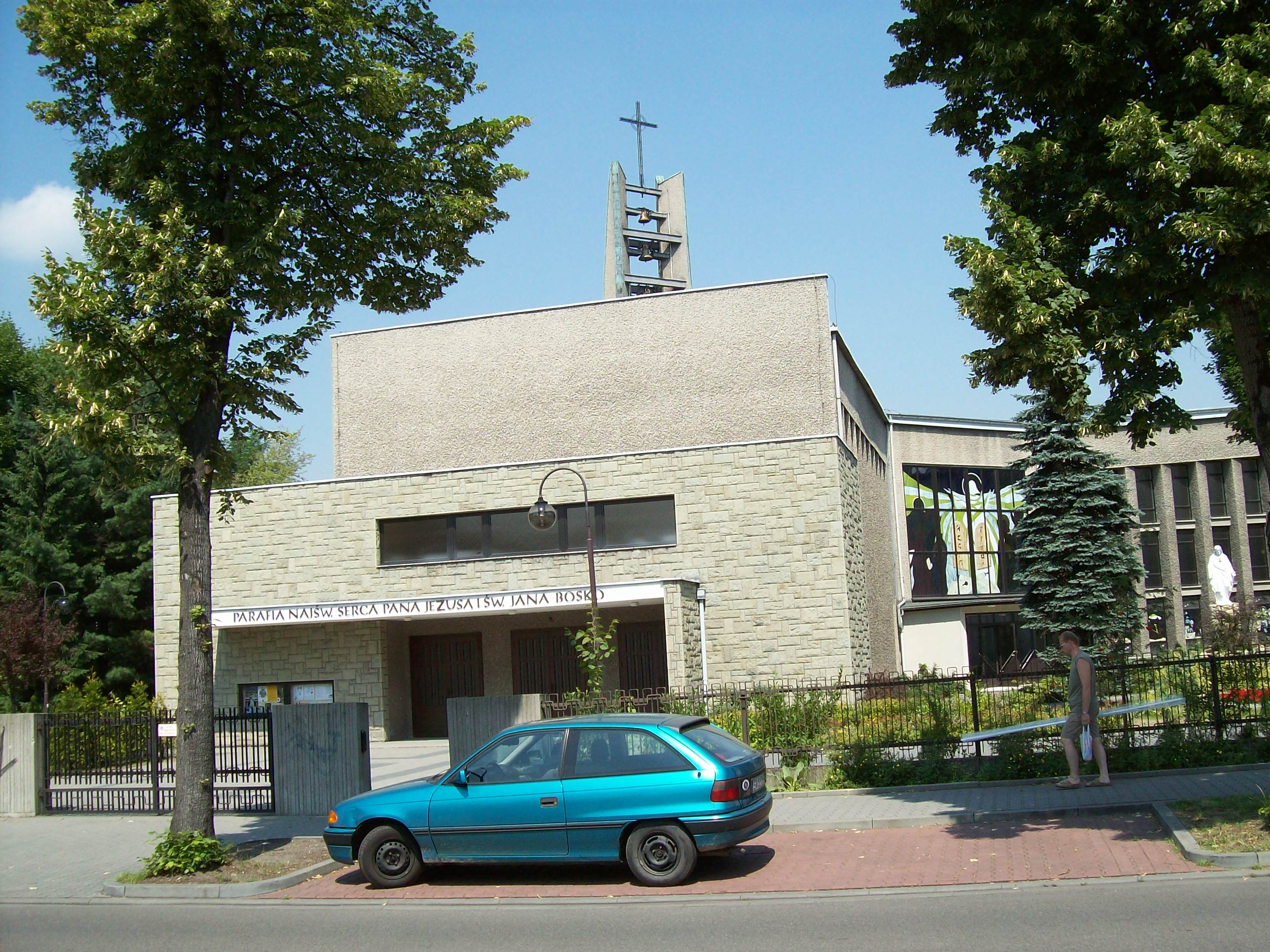 Kościół pw.NajświętszegoSerca Pana Jezusa i św. Jana Bosco w Katowicach Piotrowicach